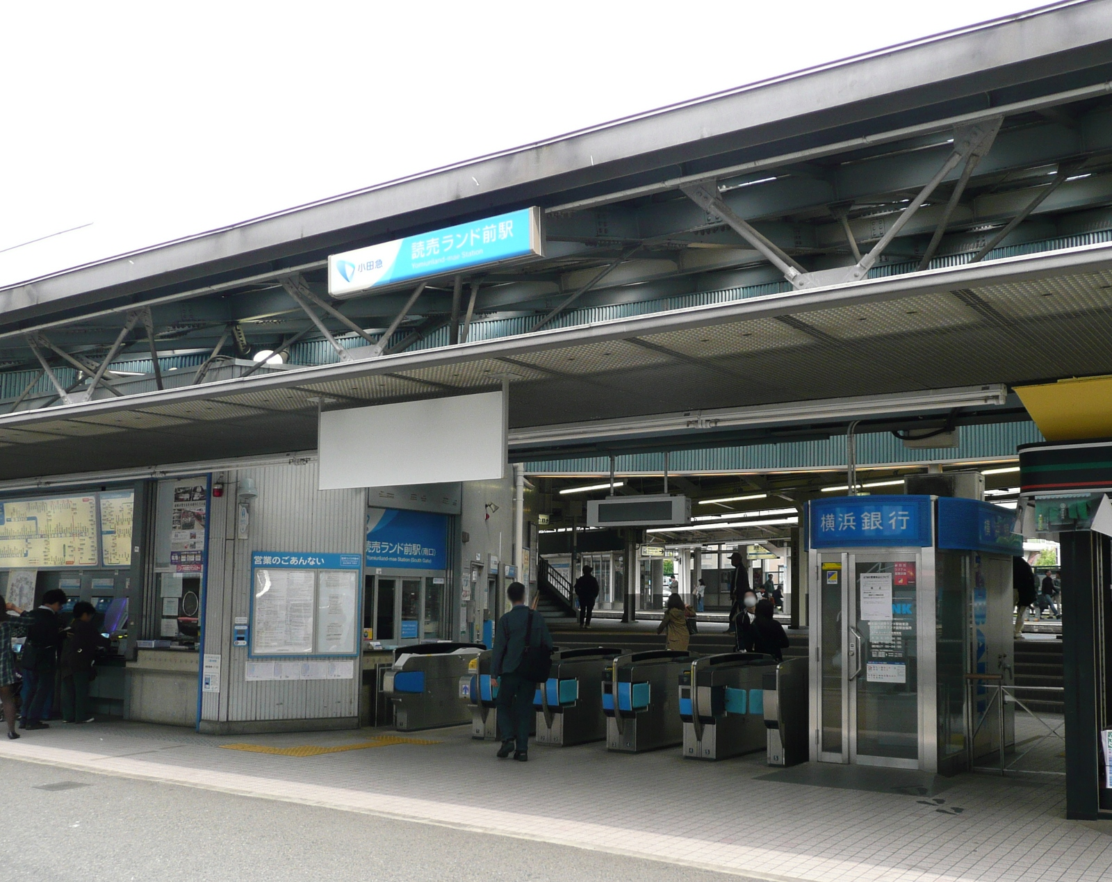 読売ランド前駅南口